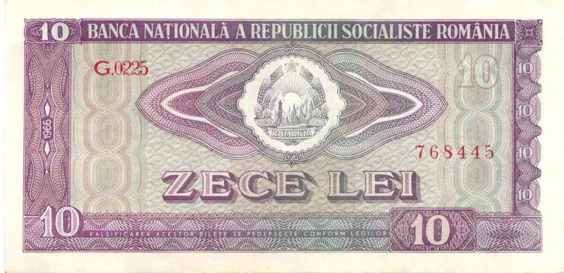 Romanian coin